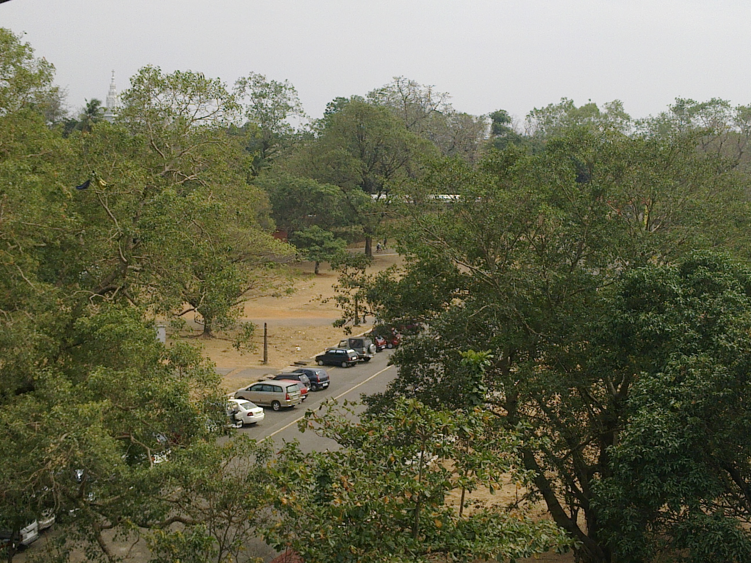 തൃശ്ശൂർ റൗണ്ട്. നായ്കനാൽ ജങ്ഷനു സമീപം, പടിഞ്ഞാറെ നട